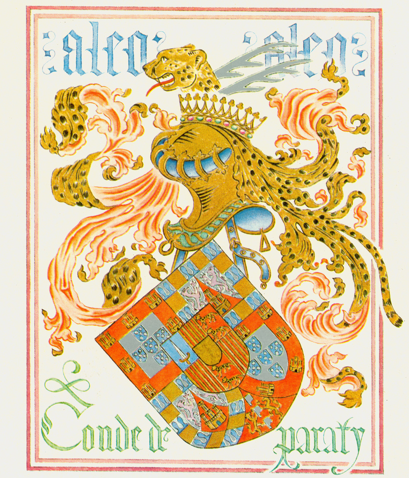 Ex-libris em policromia, desenhou D. Miguel, gravou Paes Ferreira